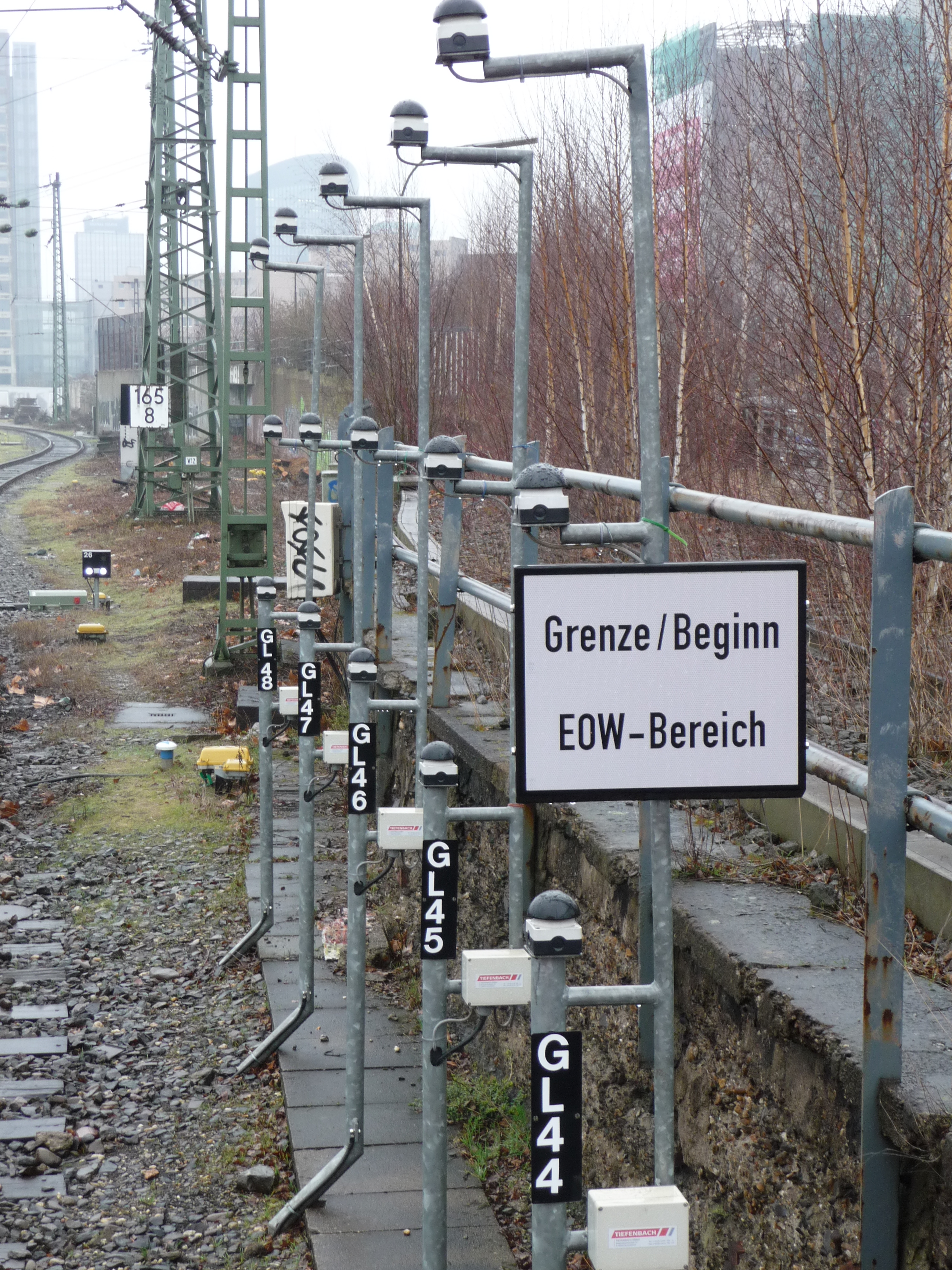 Einfache Bedieneinrichtung eines EOW-Stellbereichs